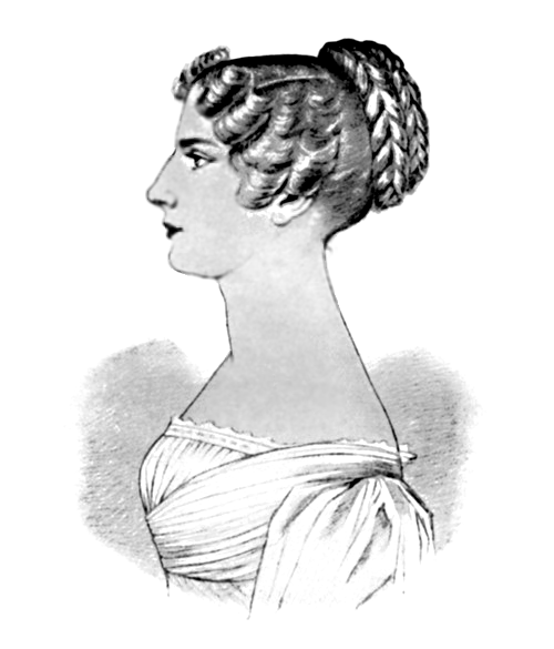 Elisa von Radziwill